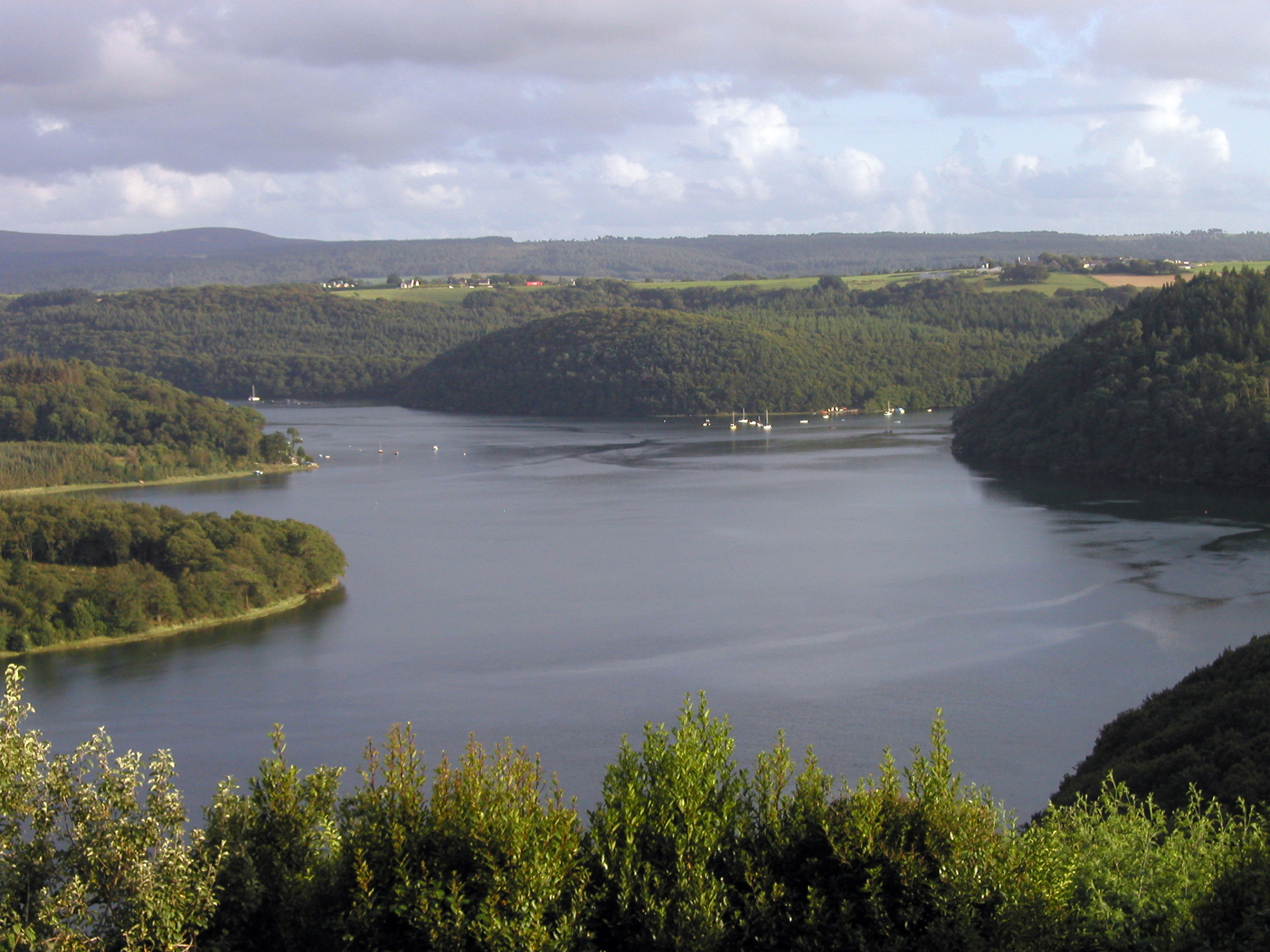 Blicke über die Rade de Brest im Landesinneren bei LandévennecBrezhoneg: Genoù ar stêr Aon